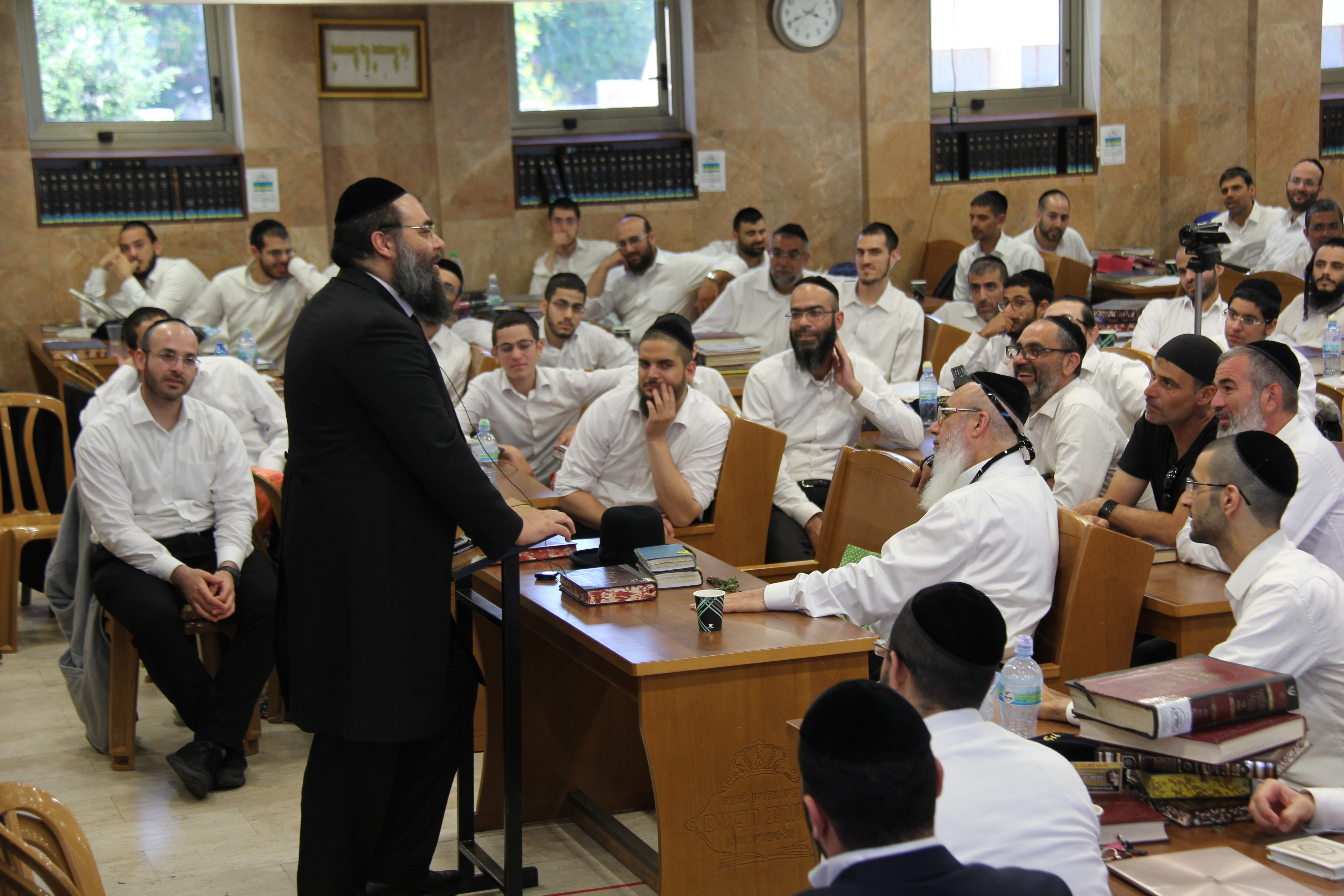 במסירת שיחה לאברכים